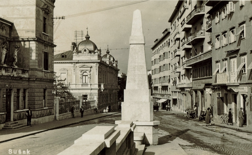 piramida, nekad